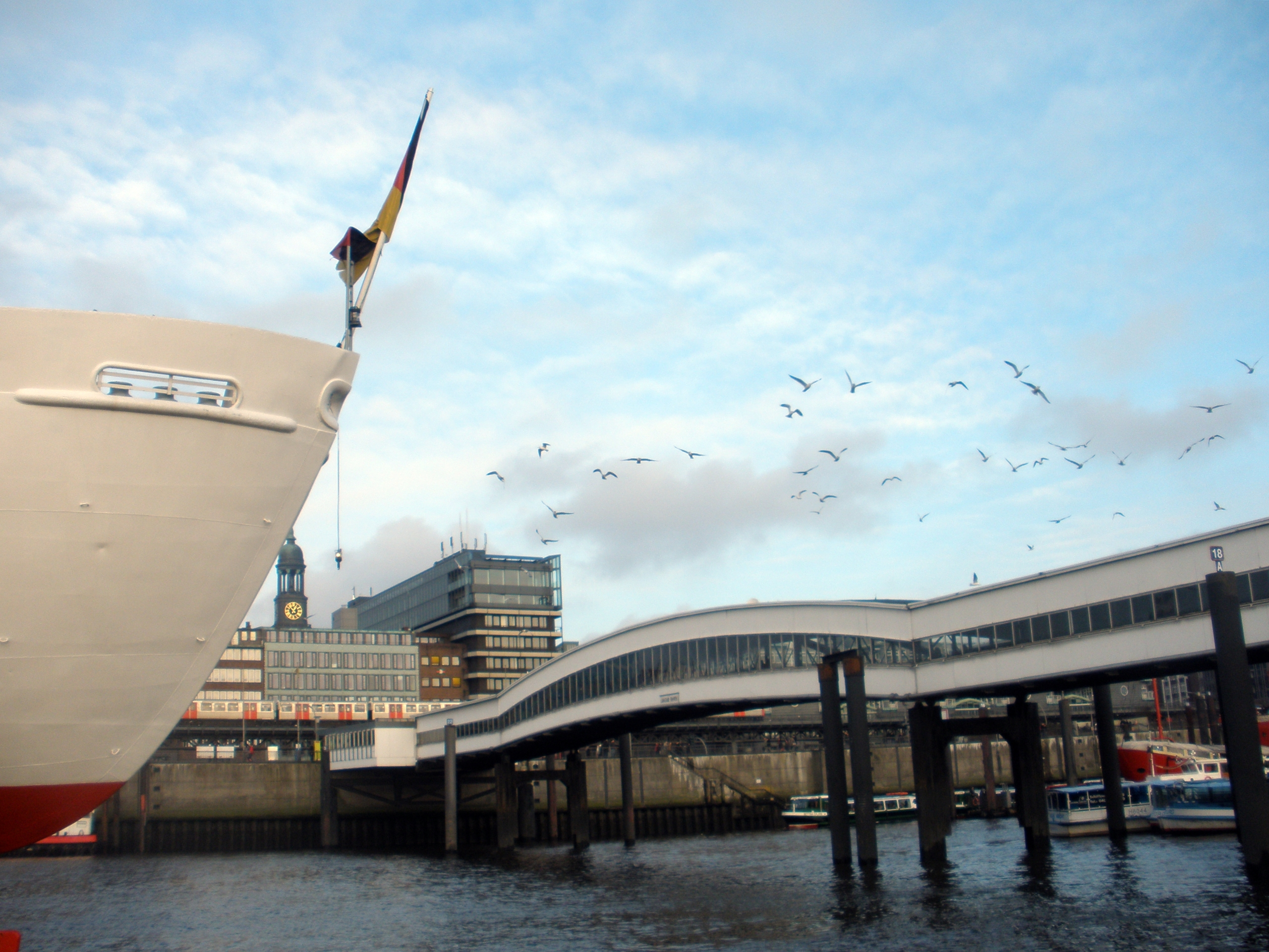 überseebrücke hamburger hafen